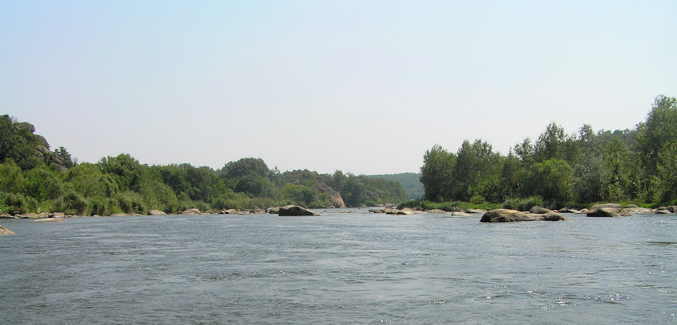 Пороги Південного Бугу неподалік м. Первомайськ (Миколаївська область)